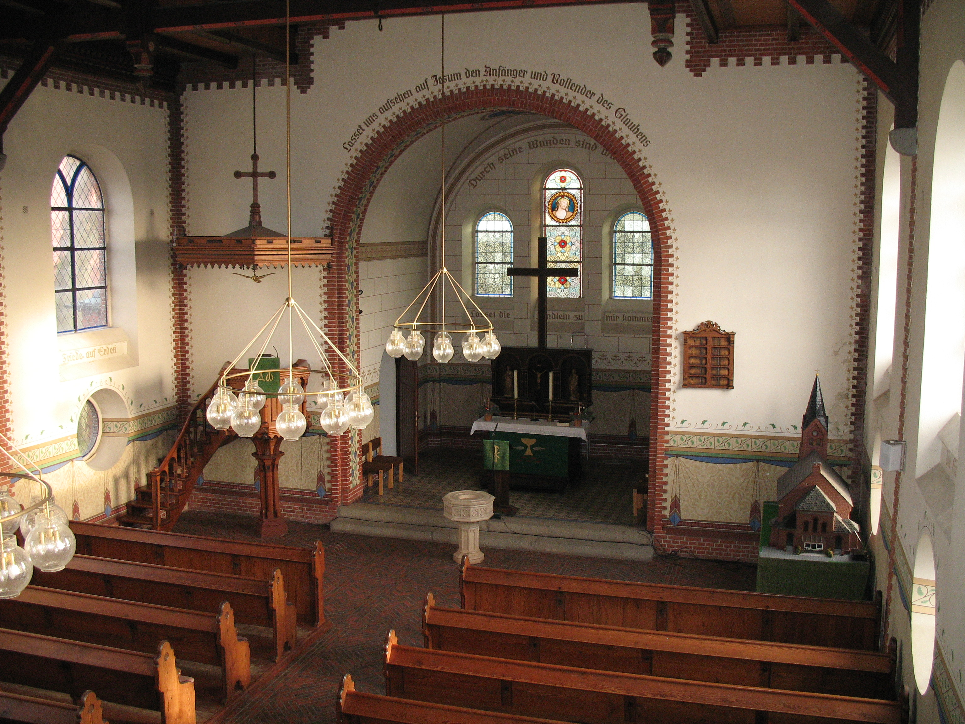 Innenraum der Kirche in Moordorf, Ostfriesland